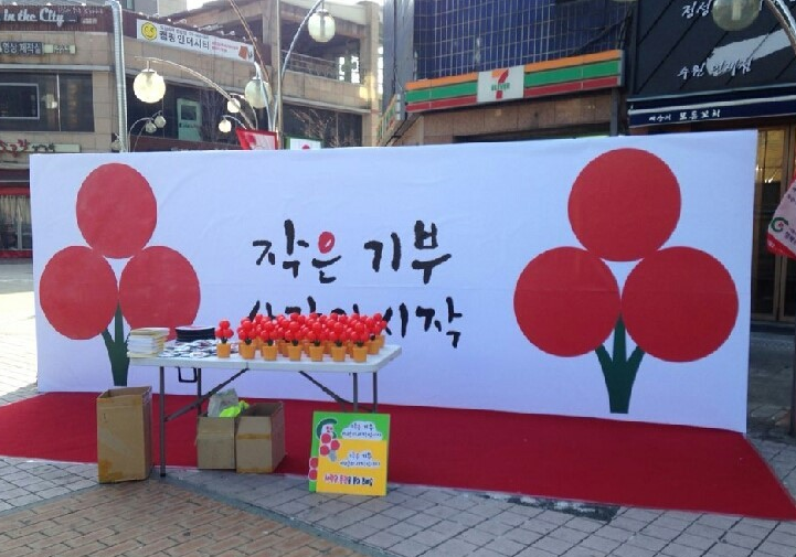 조선말: 수원 사랑의열매 행사